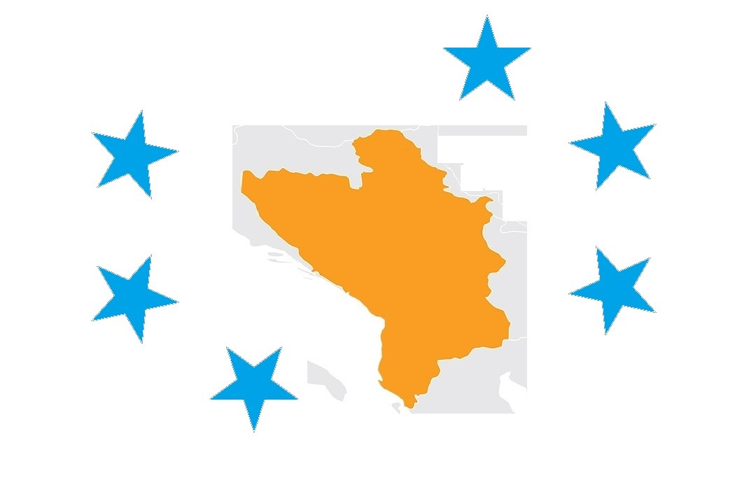 Zastava WB6